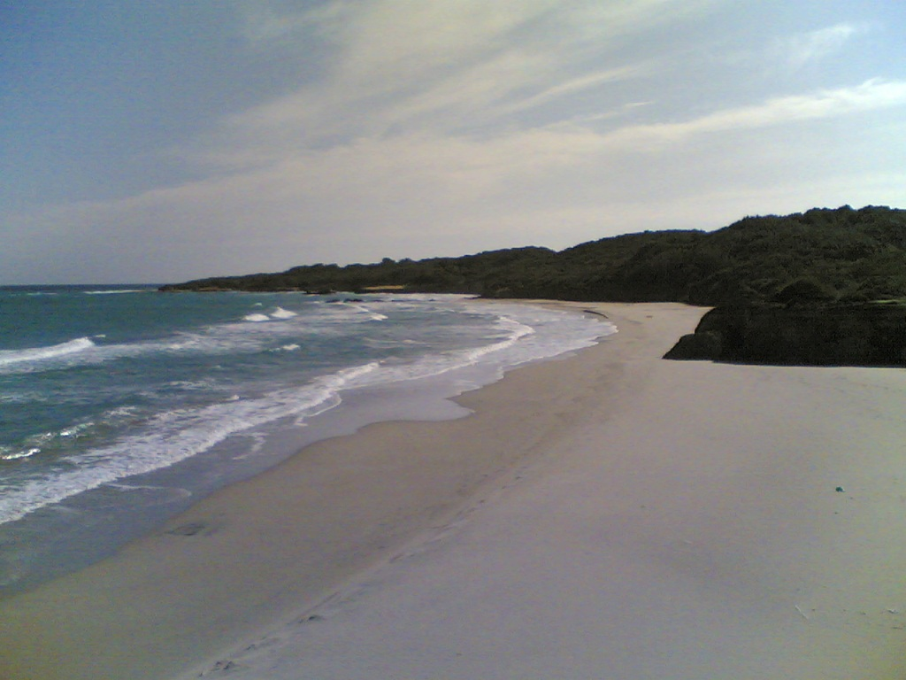 Foto della Baia dei Turchi, parte sud, 3 novembre 2007